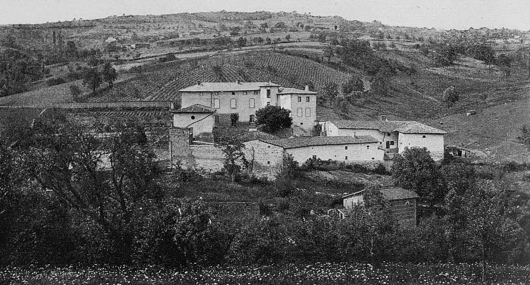 Dictionnaire illustré des communes du département du Rhône. Tome 1 / par MM. E. de Rolland et D. Clouzet.